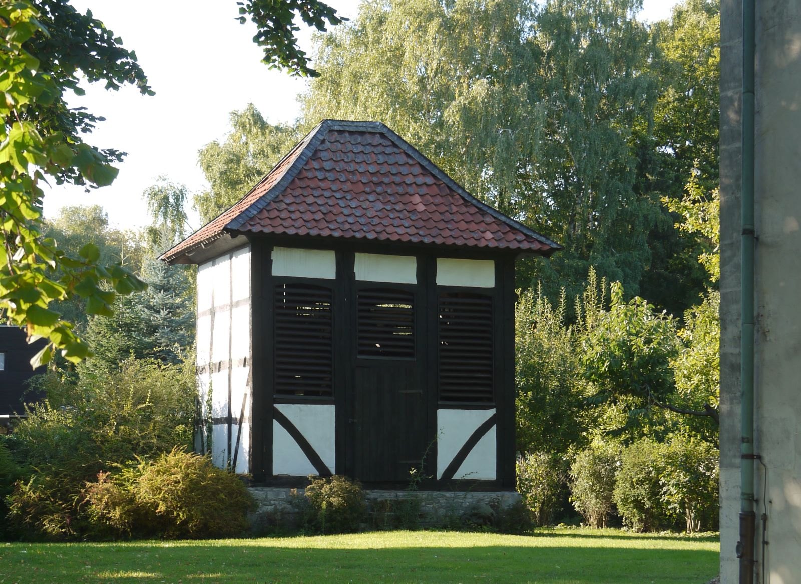 Schlosskirche (ev.) in Salzgitter-Salder - Glockenhaus